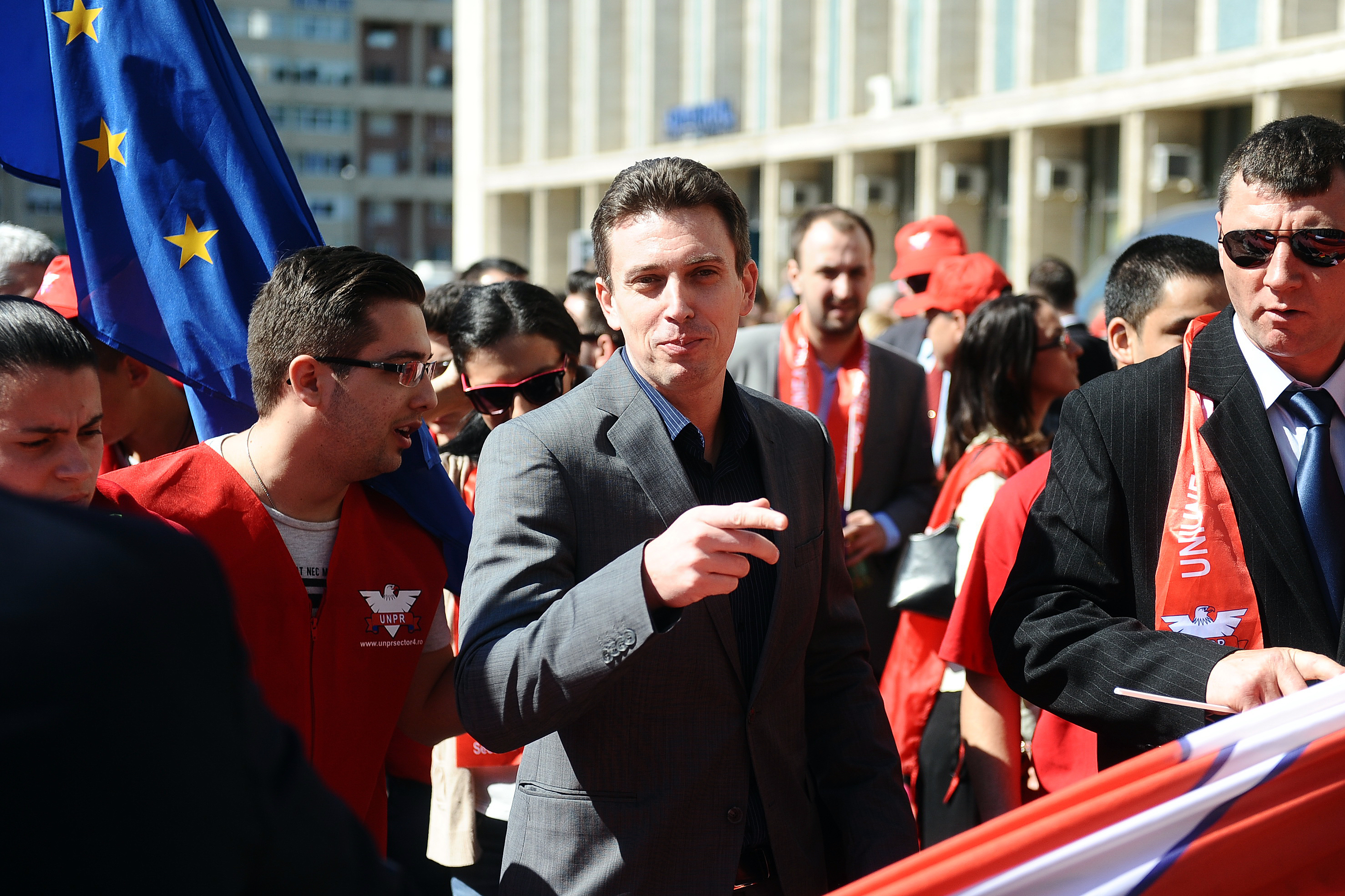 10. Catalin Ivan la depunerea listei Aliantei Electorale PSD-UNPR-PC la alegerile europarlamentare - 22.03.2014